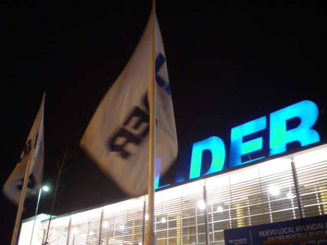 Supermercados Lider